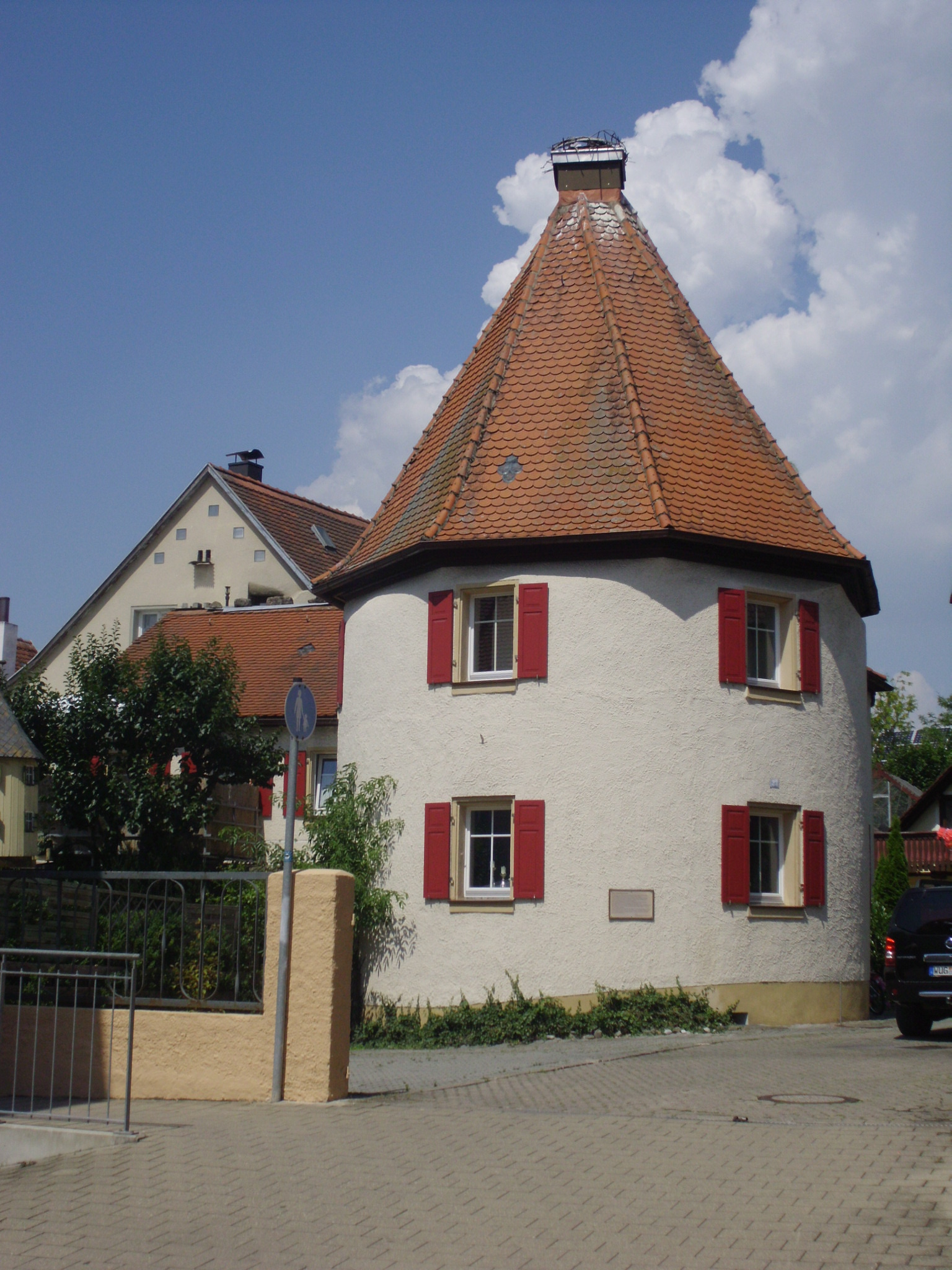 Gunzenhausen im mittelfränkischen Landkreis Weißenburg-Gunzenhausen, Sonnenstr. 23 (Storchenturm)